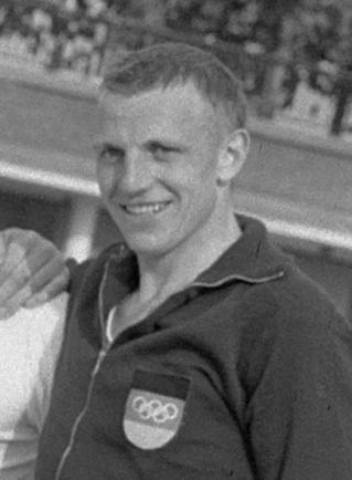 Europese roeikampioenschappen Bosbaan, Deense en Duitse met poserend. ID